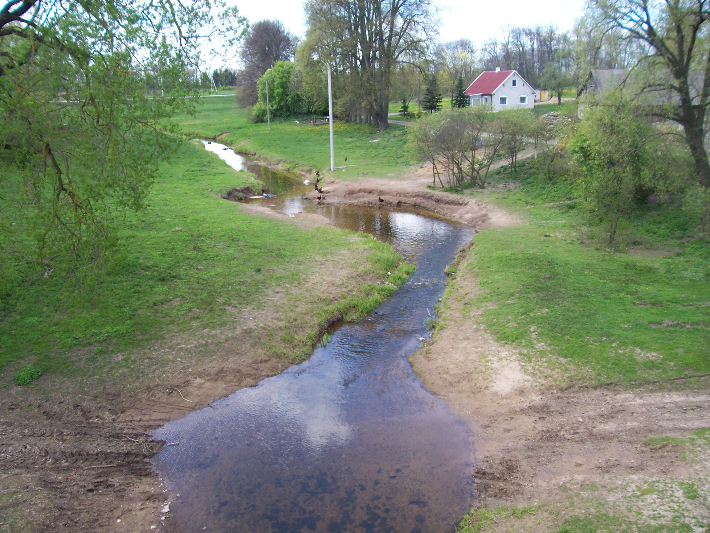 Lankesa prie Martyniškio kaimo